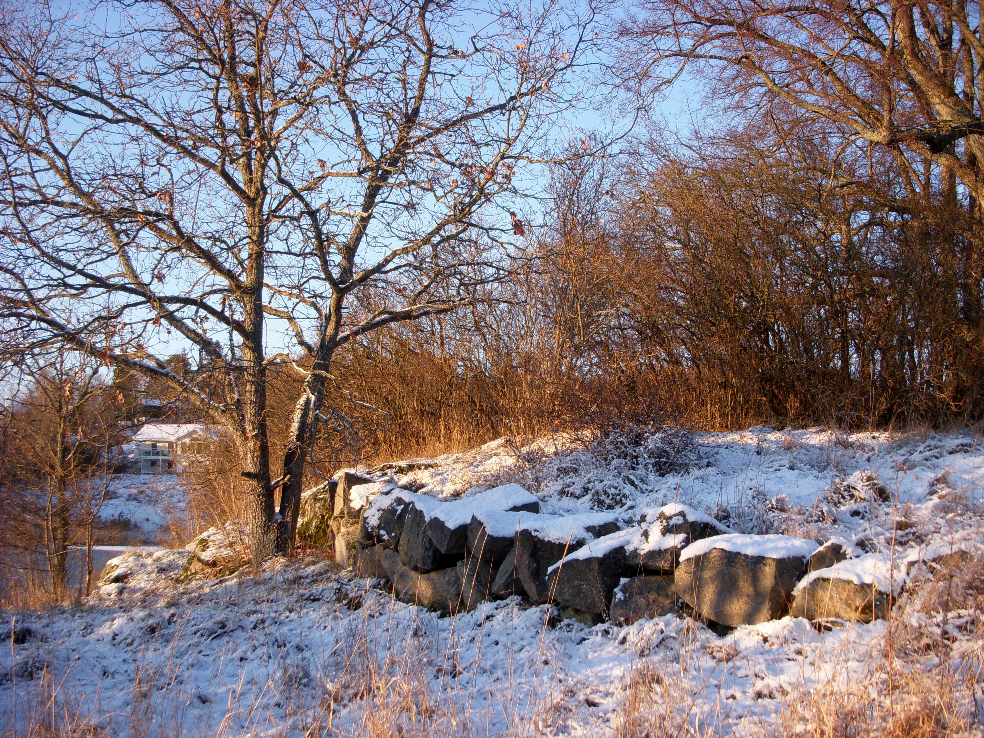 Fållans gård, Bellmanslindarna